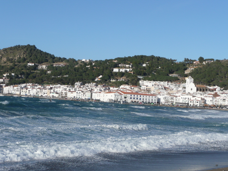 el Port de la Selva (Alt Empordà)